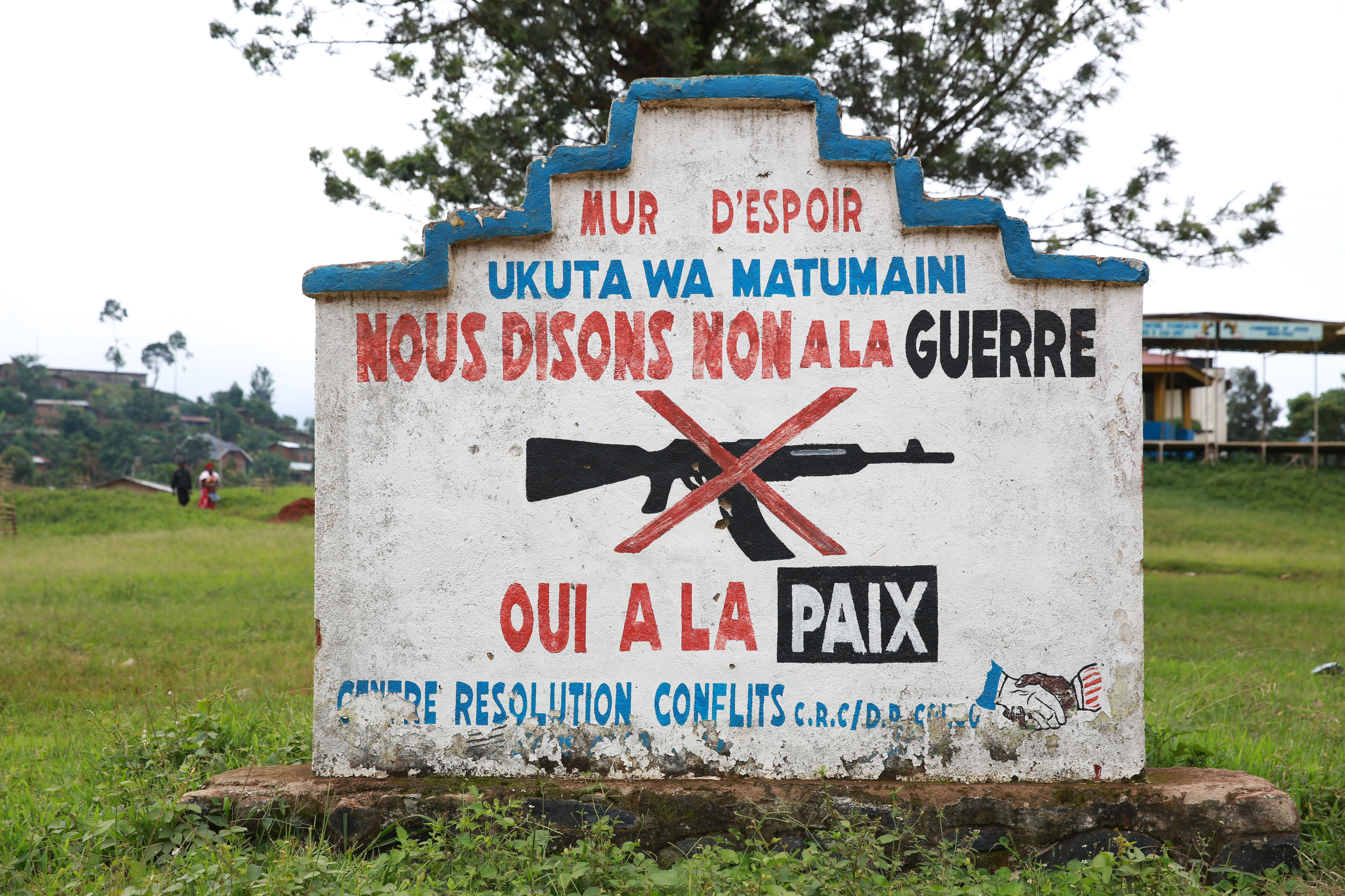 LEGENDE : Beni, Nord Kivu, RD Congo. 4 décembre 2014 : Mur d’espoir. La MONUSCO, les FARDC et le peuple congolais disent non à la guerre et mettent tout en œuvre pour que les massacres des populations civiles prennent fin. Photo MONUSCO/Abel Kavanagh CAPTION: Beni, North Kivu, DR Congo, 4 December 2014: Wall of hope. MONUSCO, FARDC and the Congolese people say no to war and are doing all in their power to put an end to the massacres of civilians. Photo MONUSCO/Abel Kavanagh